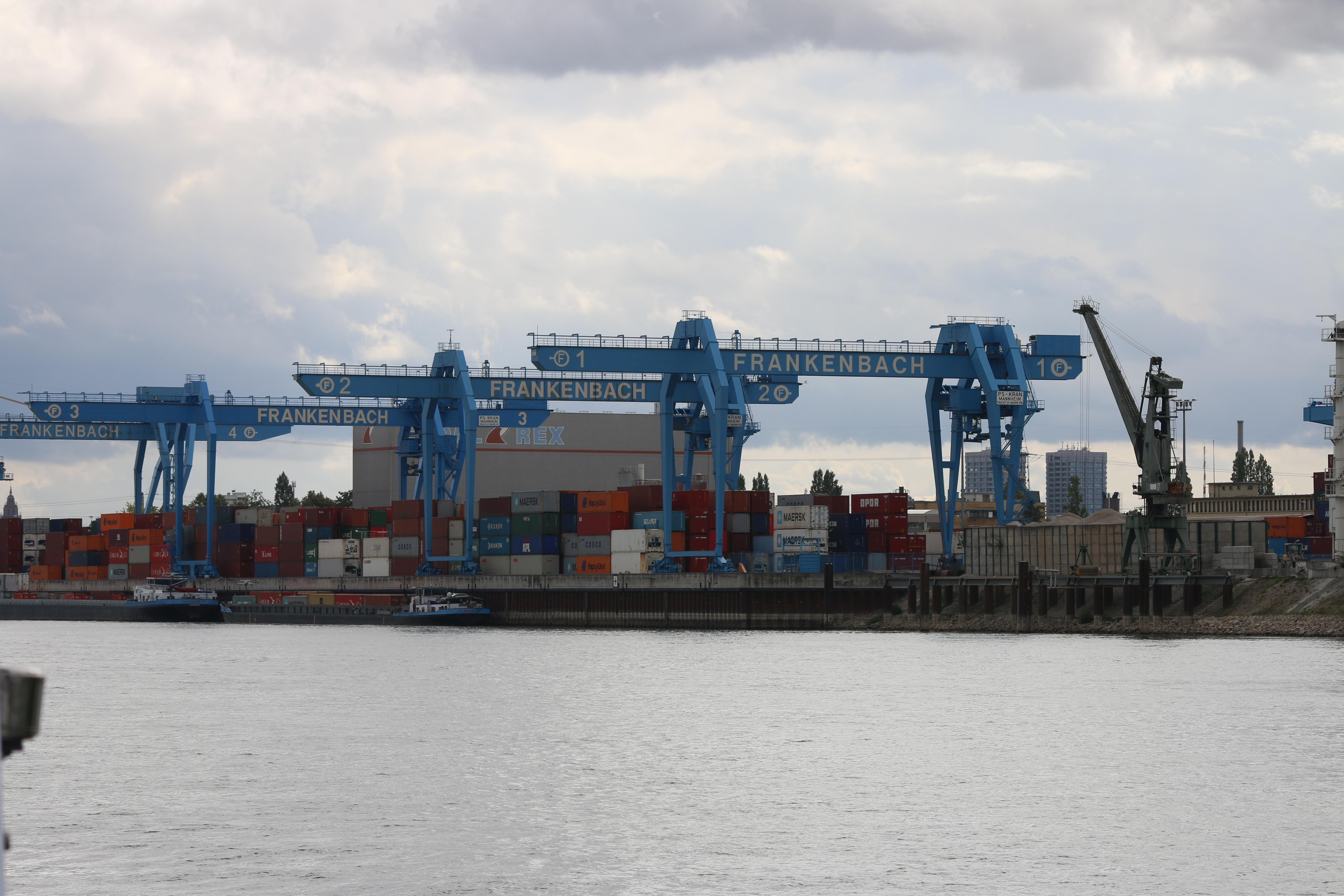 Mainz: Containerterminal am Binnenhafen